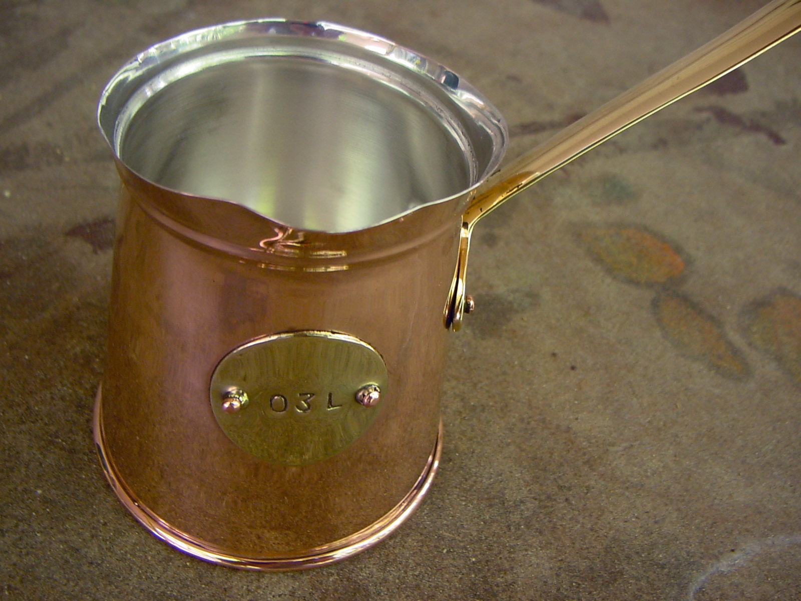 Ibrik coffee brewer